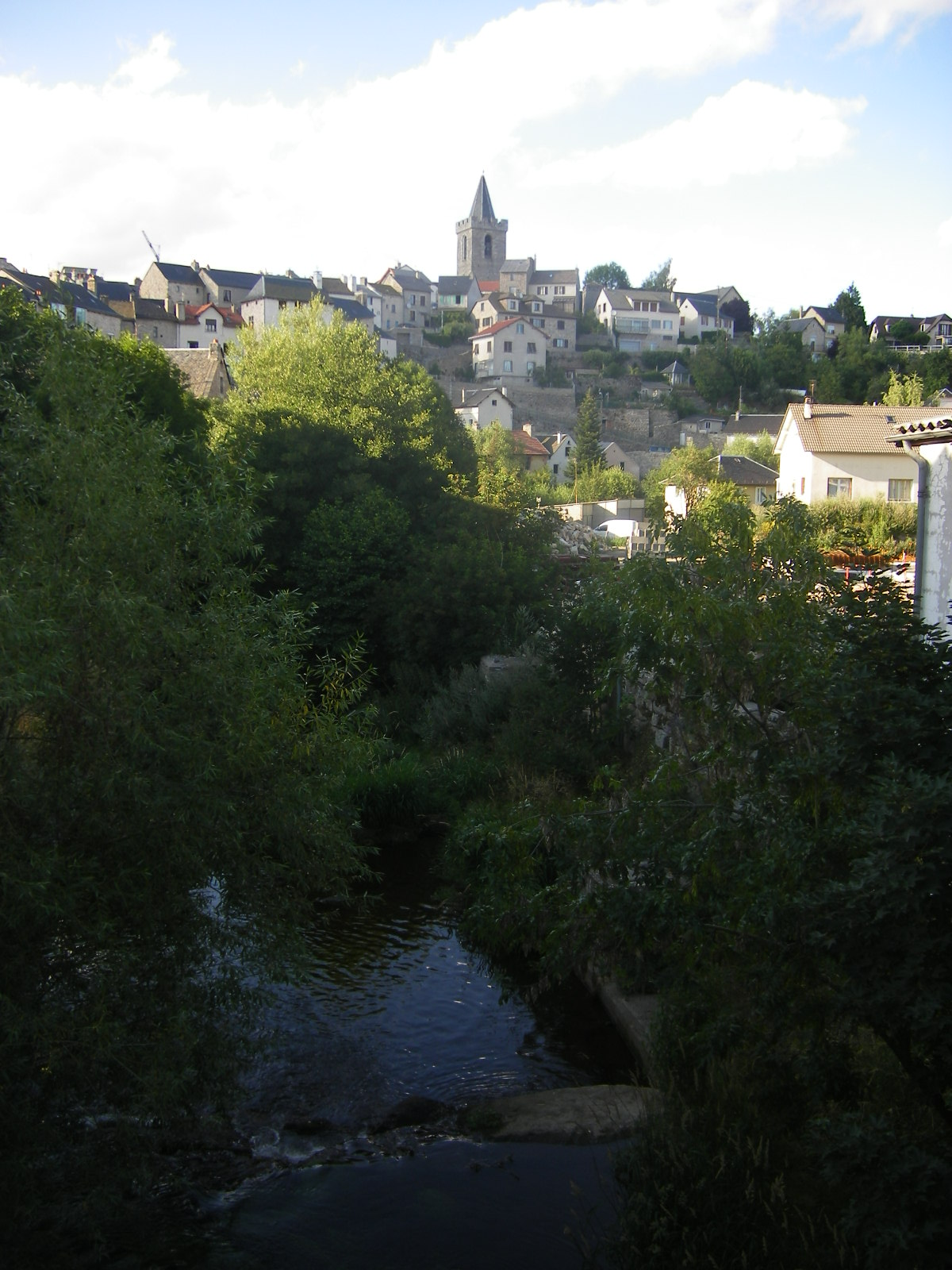 Saint-Chély-d´Apcher